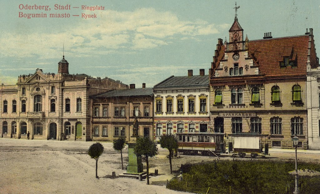 Starý Bohumín - náměstí